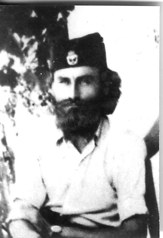 Ово је слика команданта Милорада Мила васић која јнађена у Гледићкој воденици где је његов био штаб.е